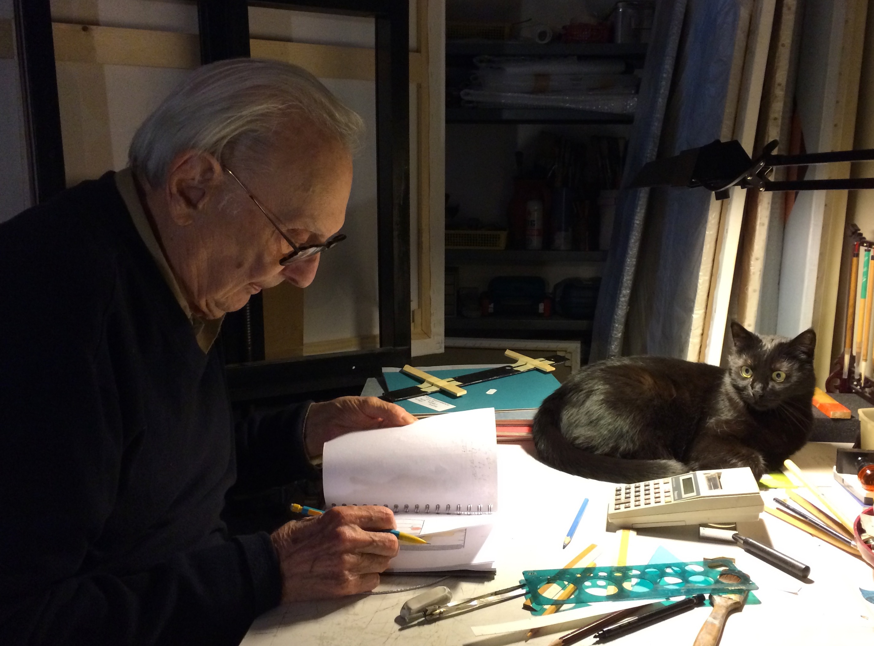 Carlo Nangeroni nel suo Studio milanese